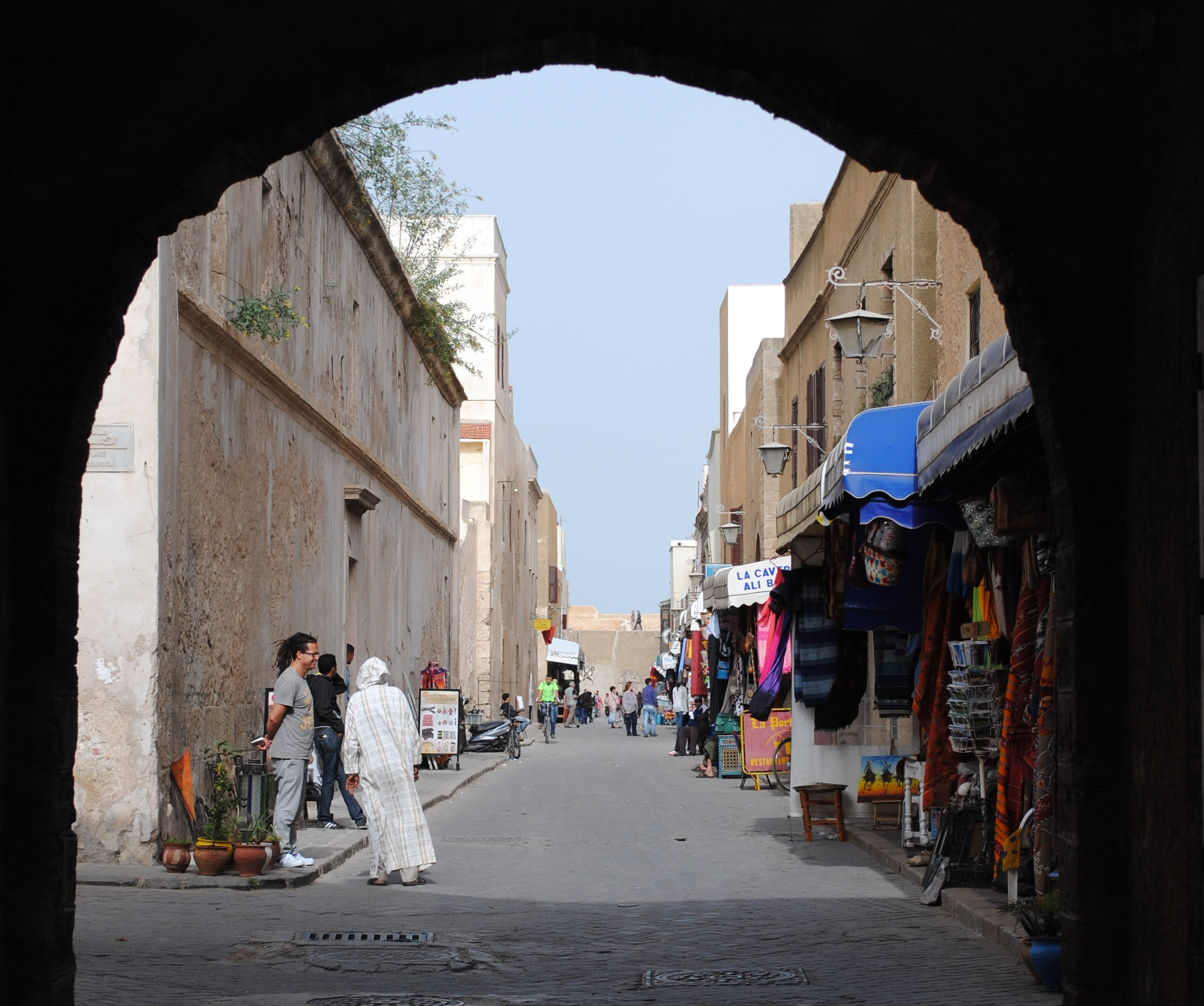 Ruelle à l'entrée de la forteresse d'el Jadida